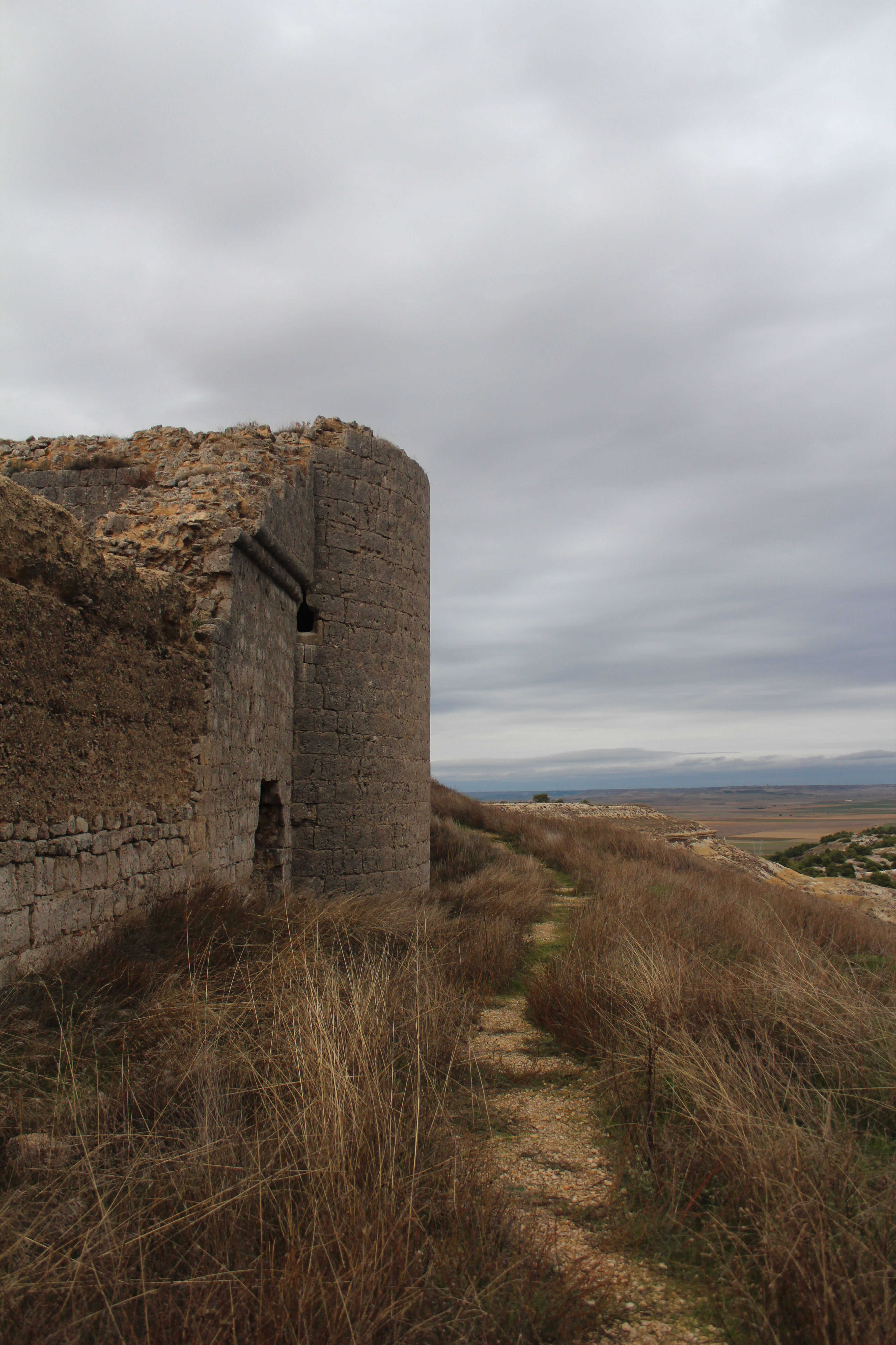 Fotografía de las ruinas del Castillo de Torremormojón en la provincia de Palencia, España.